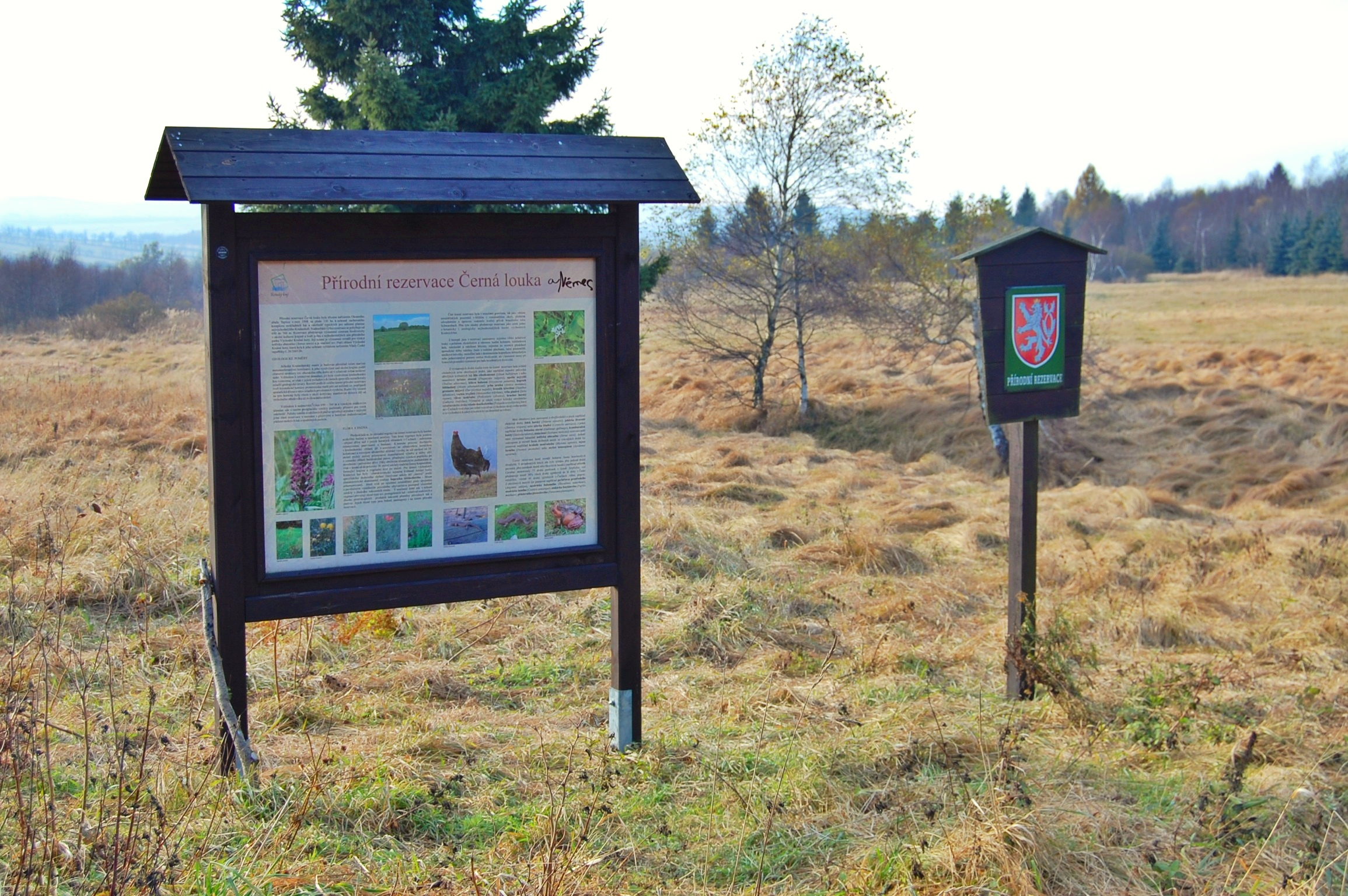 Informační tabule a značka přírodní rezervace Černá louka v okrese Teplice